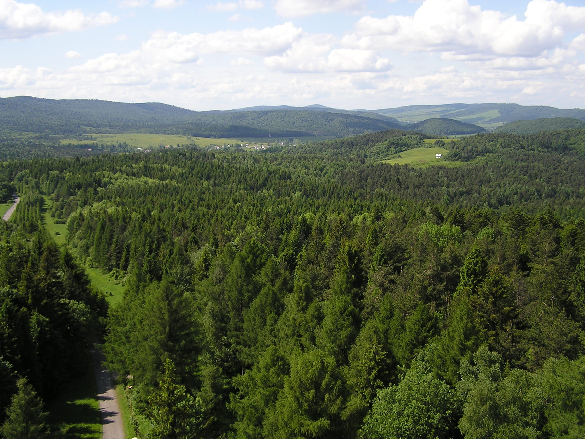 Panoráma duklianskeho priesmyku 1. V tomto priestore zahynulo v roku 1944, obojstranne 10 km od štátnej hranie na územi Poľska a ČSR viac ako 10 000 mladých mužov a skoro 90 000 ich pre zranenie bolo vyradených z ďalšej bojovej činnosti